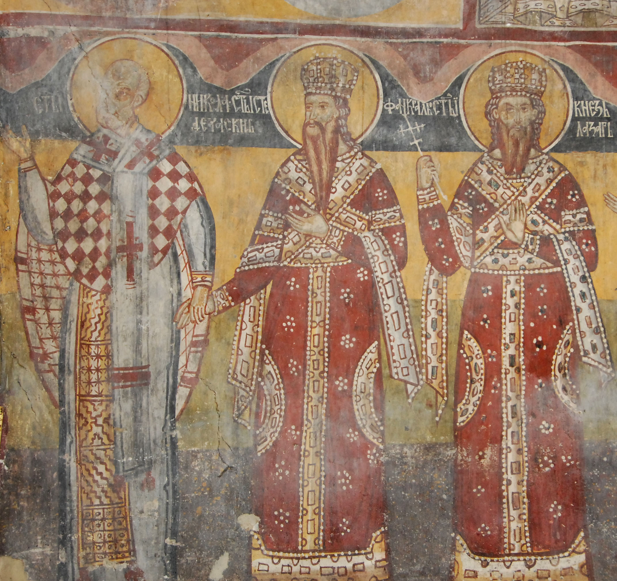 Фреска у цркви манастира Јежевица из 1636. године